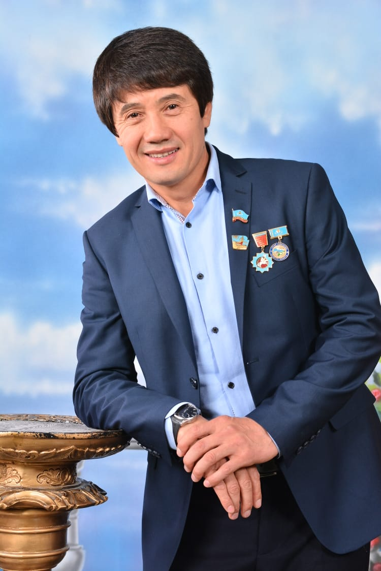 Заслуженный тренер Казахстана по кикбоксингу, мастер спорта международного класса по ушу-саньда, мастер спорта по боксу Имид Тохтасун